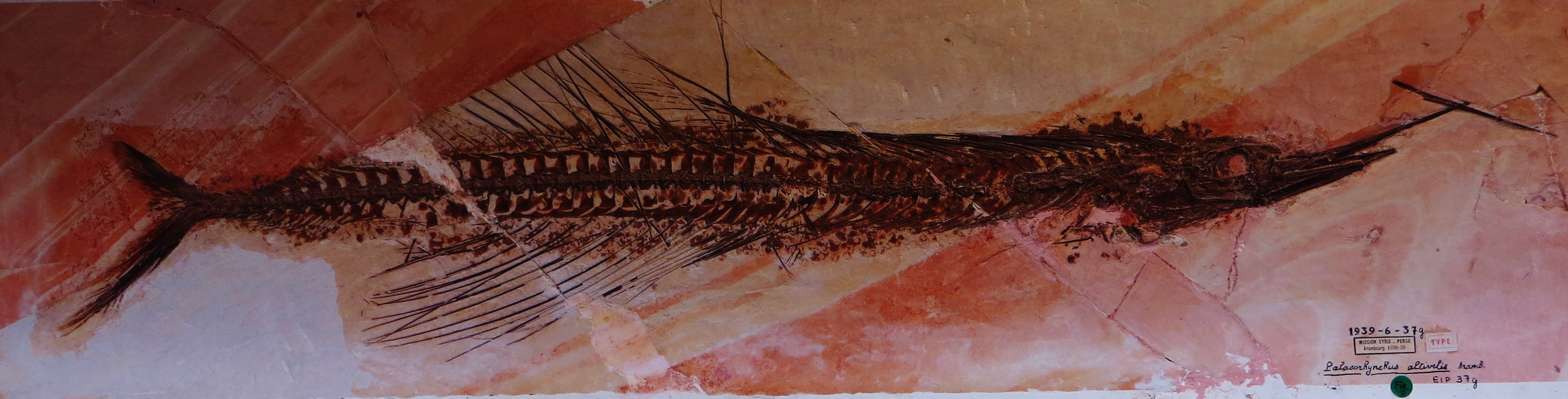 Fossil of Palaeorhynchus, an extinct fish- Took the photo at Musee d'Histoire Naturelle, Paris